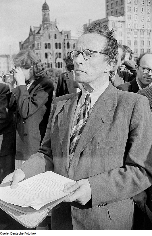 Original image description from the Deutsche Fotothek Portrait Vincenz Müllers auf der Friedenskundgebung am 22. Juni 1950